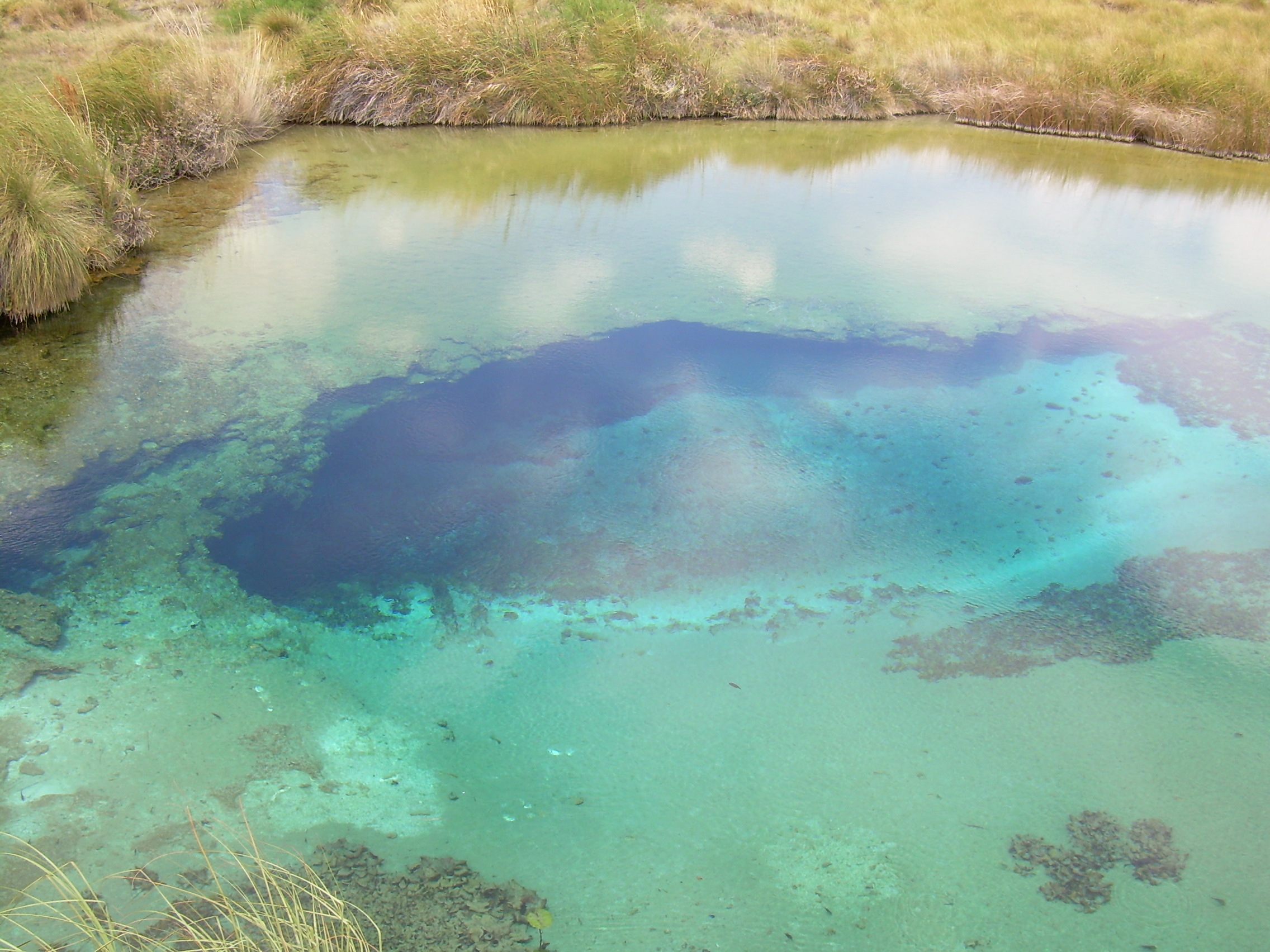 La Poza Azul en Cuatro Ciénegas, Coahuila, México.